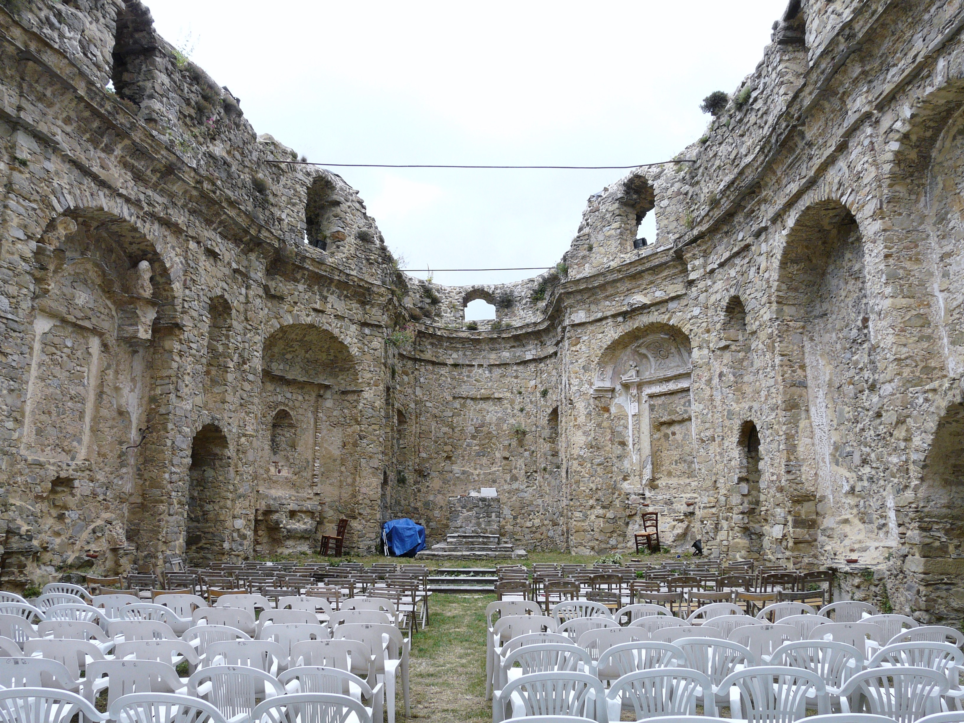 Interni dell'antica chiesa di San Nicolò, Bajardo, Liguria, Italia